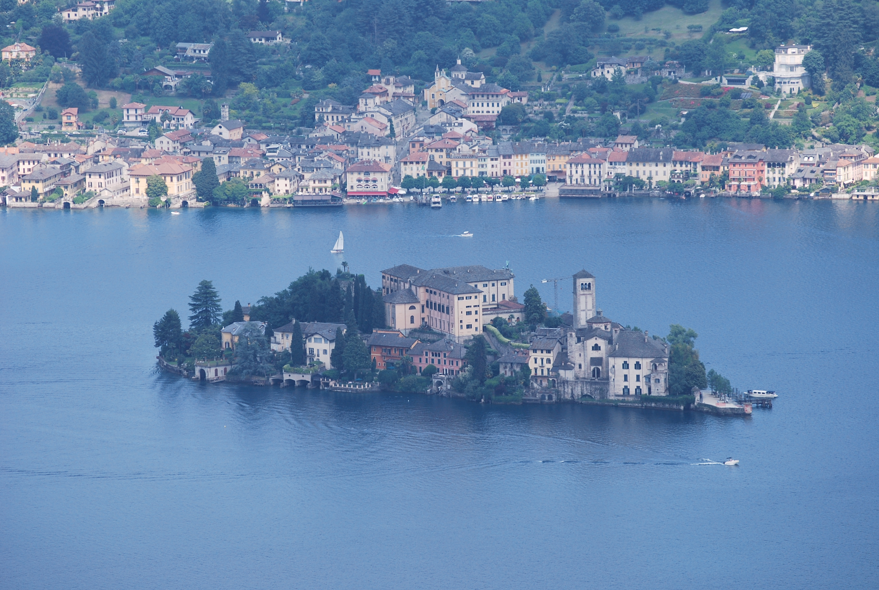 Isola di San Giulio - Lago d'Orta vista dal Santuario della Madonna del Sasso